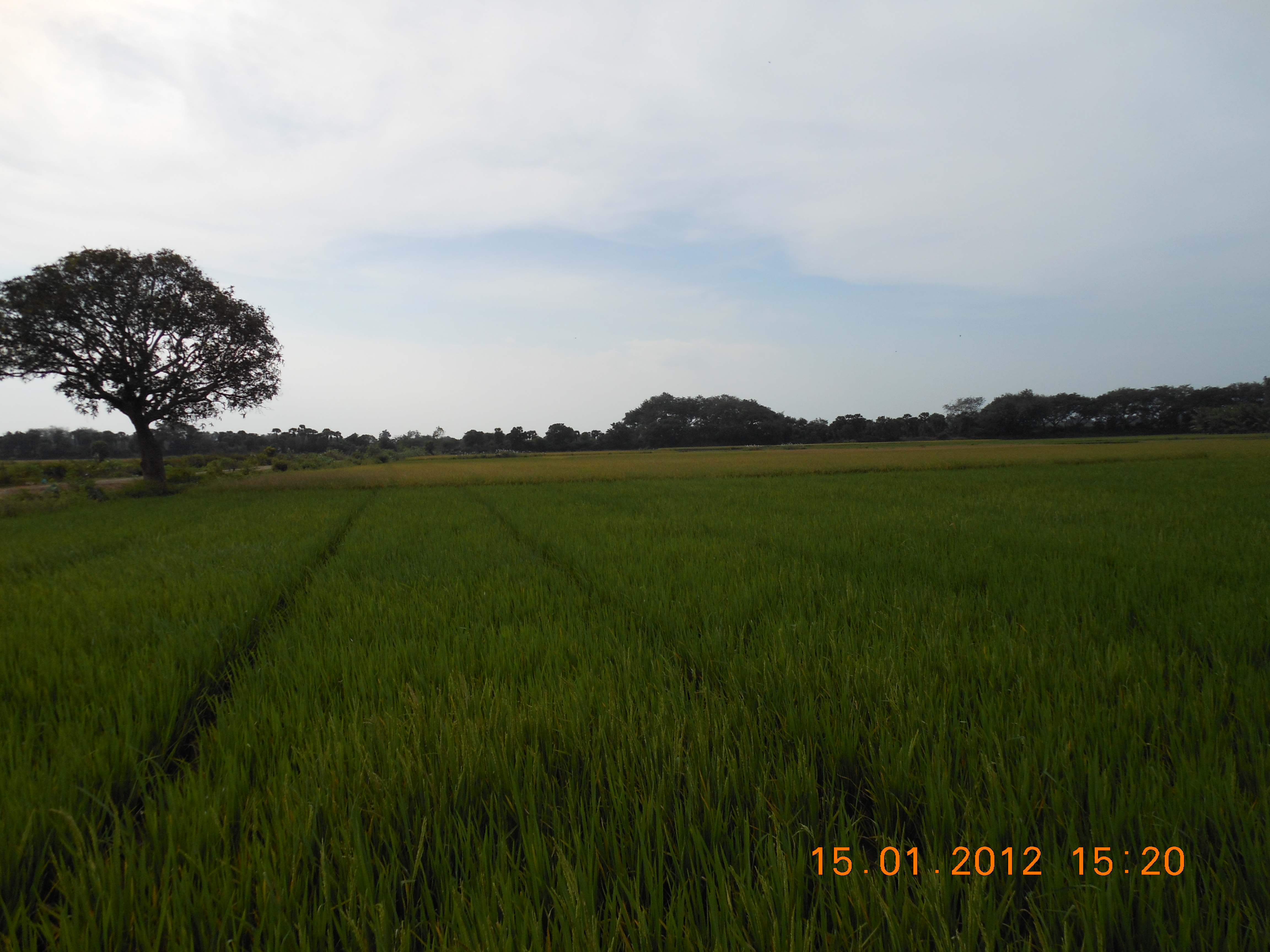 பசுமையான வயல் வெளி